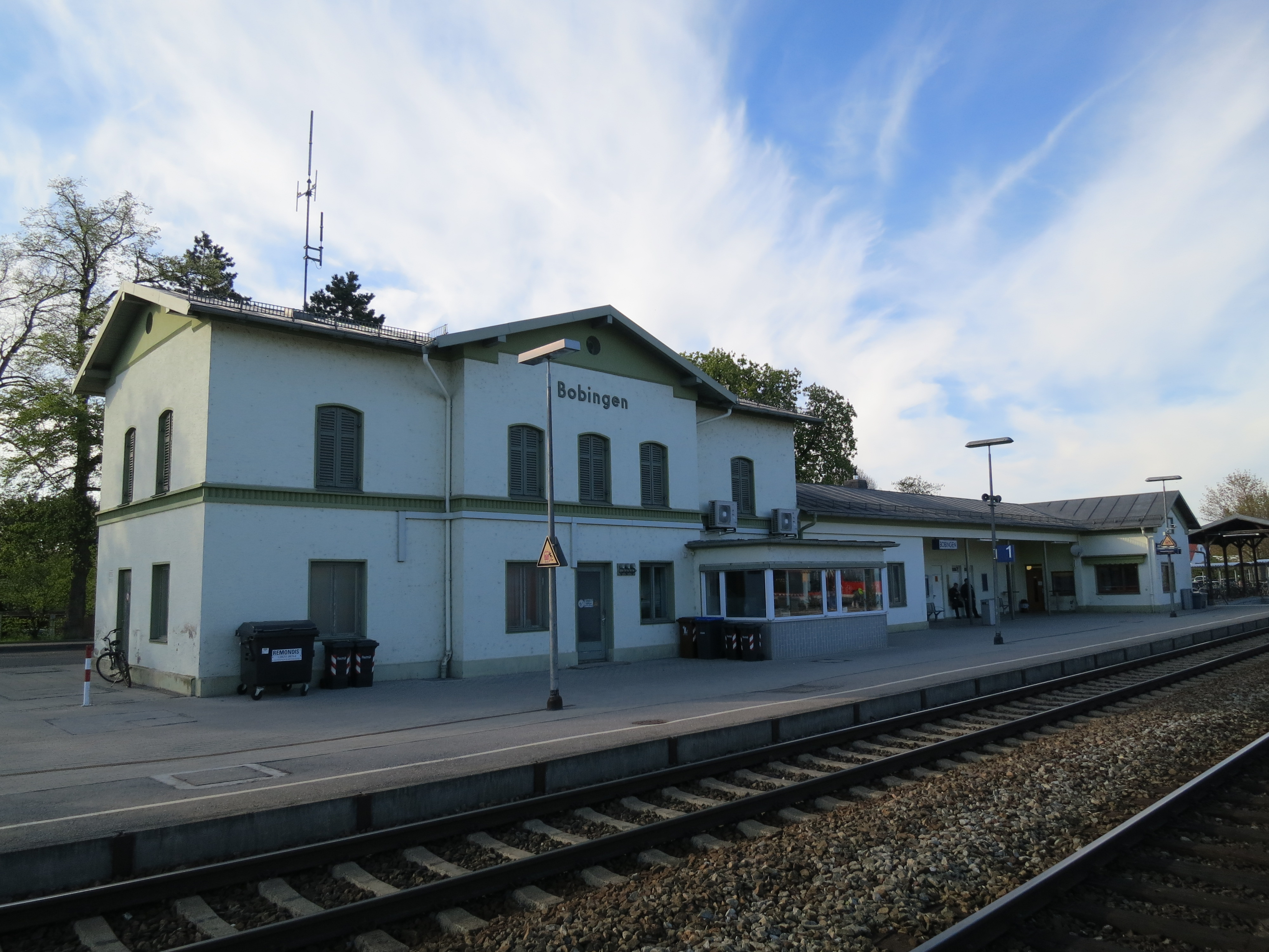 Empfangsgebäude des Bahnhofs Bobingen von der Gleisseite